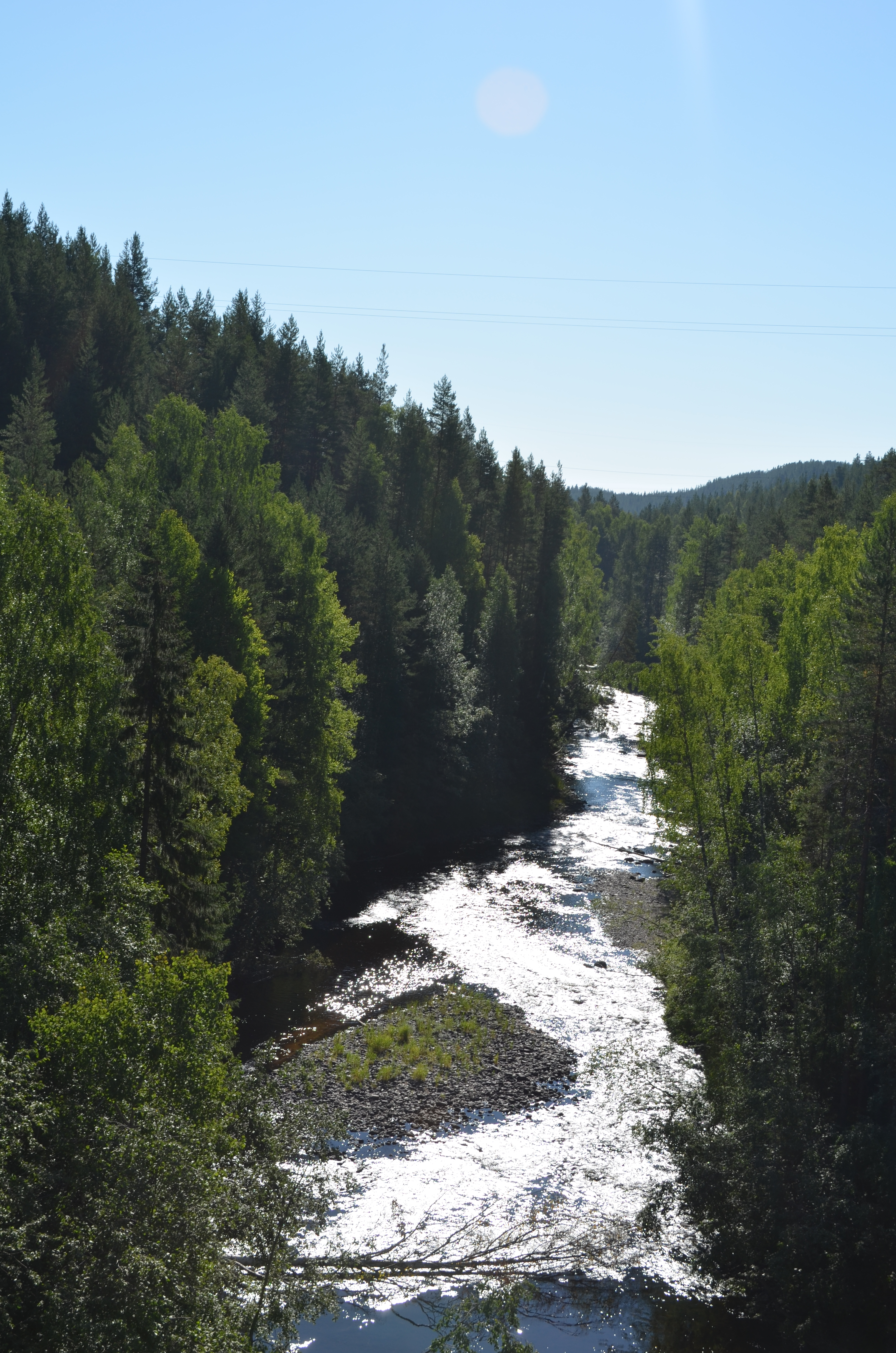 Річка Кумса поблизу Мєдвєж'єгорська